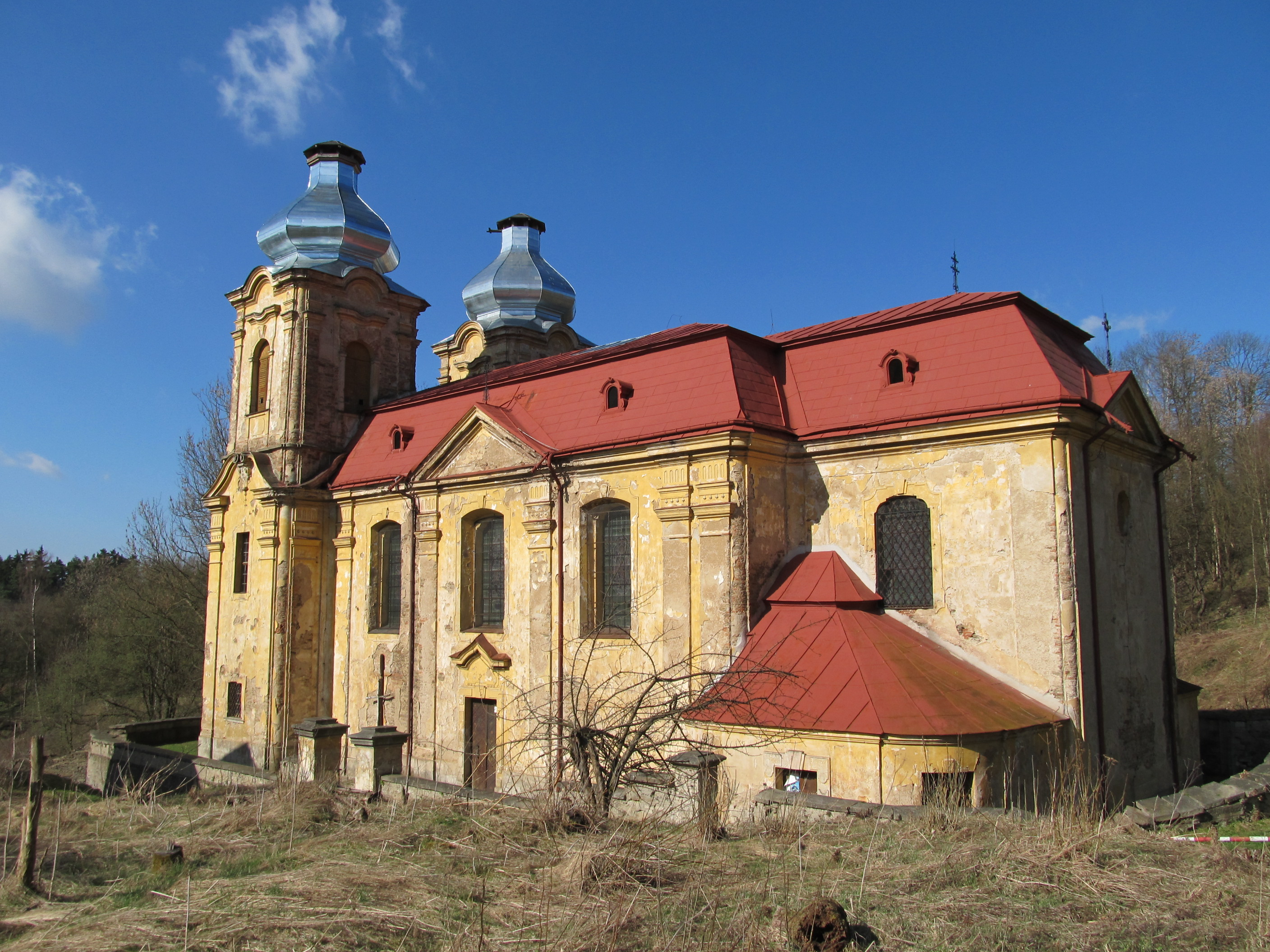 Kostel Navštívení P. Marie (Skoky), Skoky